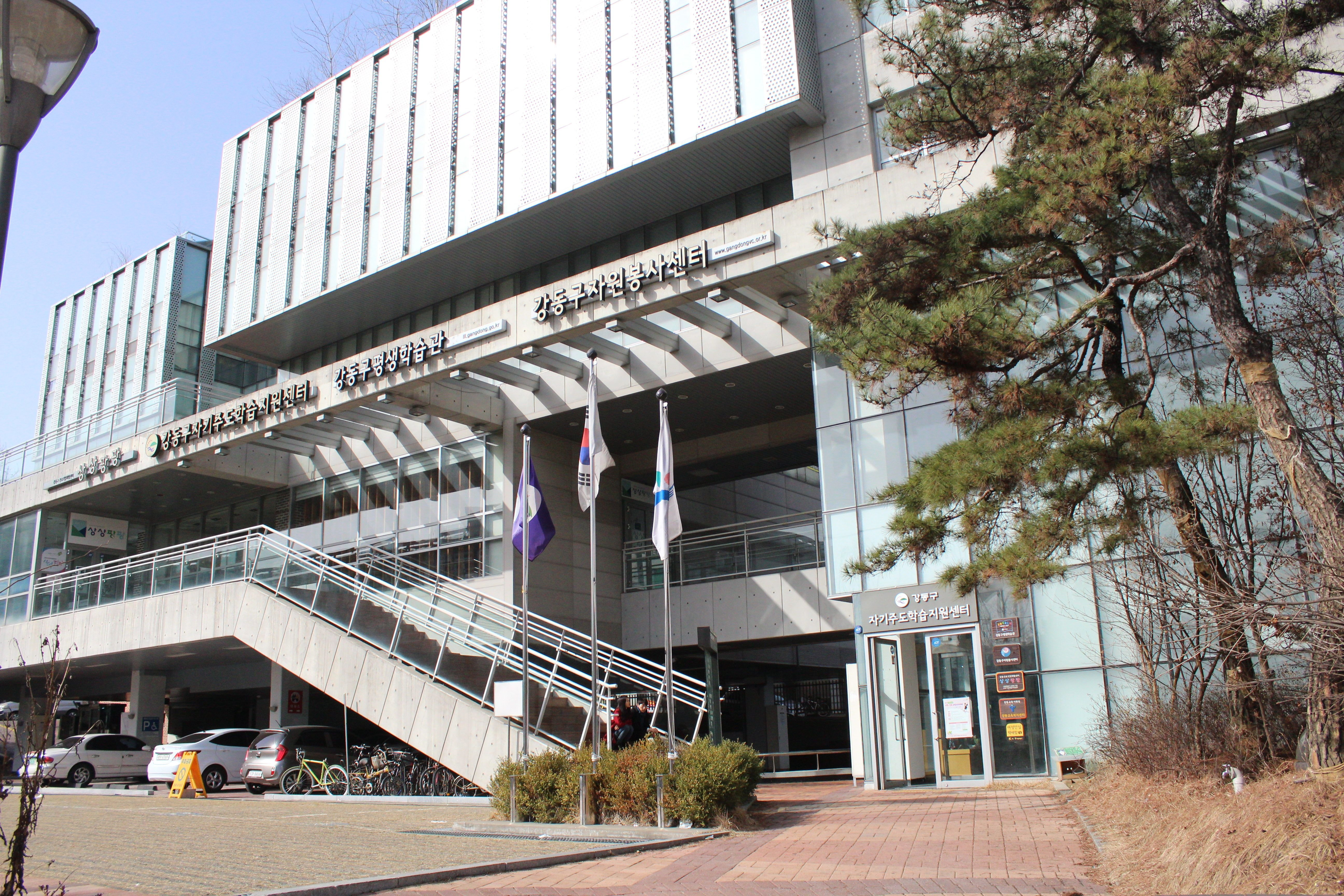 강동구 자기주도학습센터